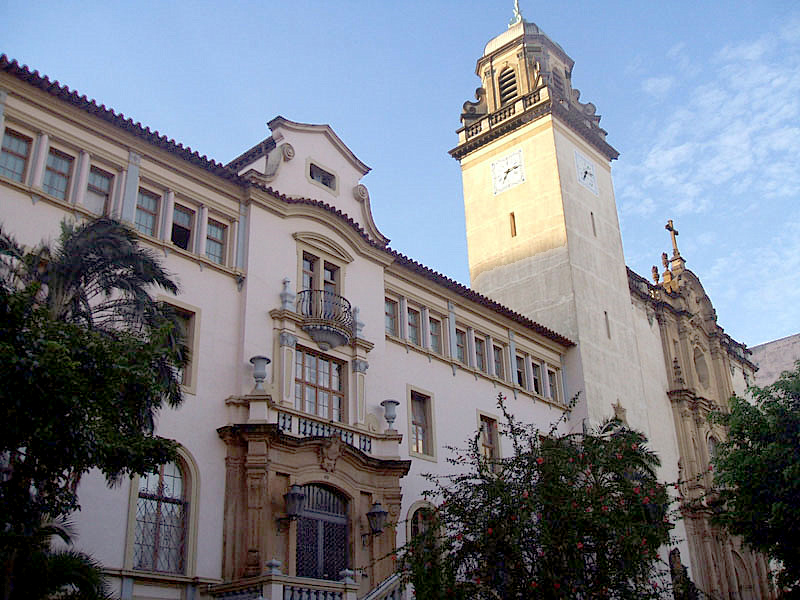 Basílica de Nossa Senhora do Carmo, São Paulo, Brasil